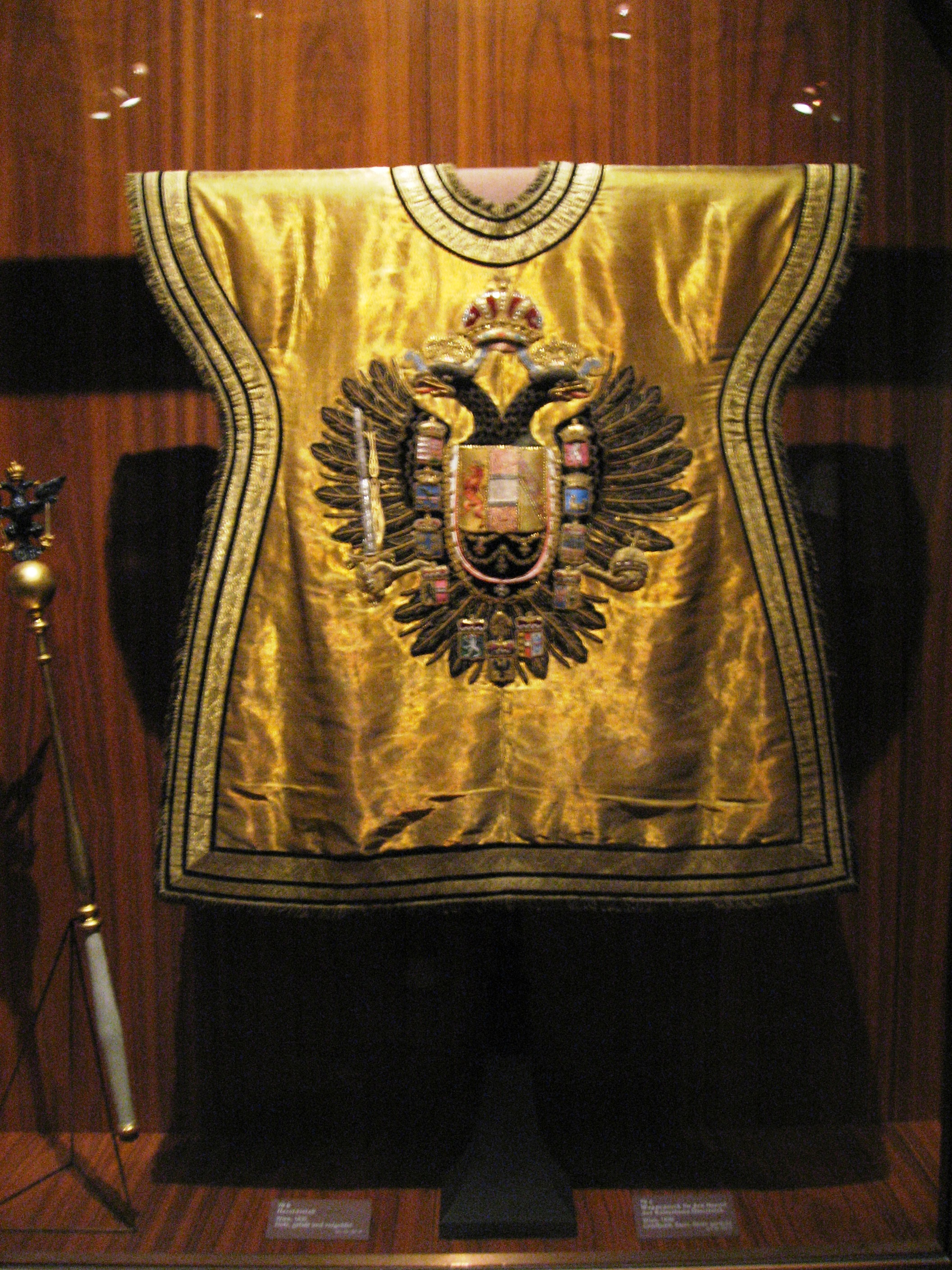 Wappenrock für den kaiserlichen Herold. Samt, Seide, Gold.